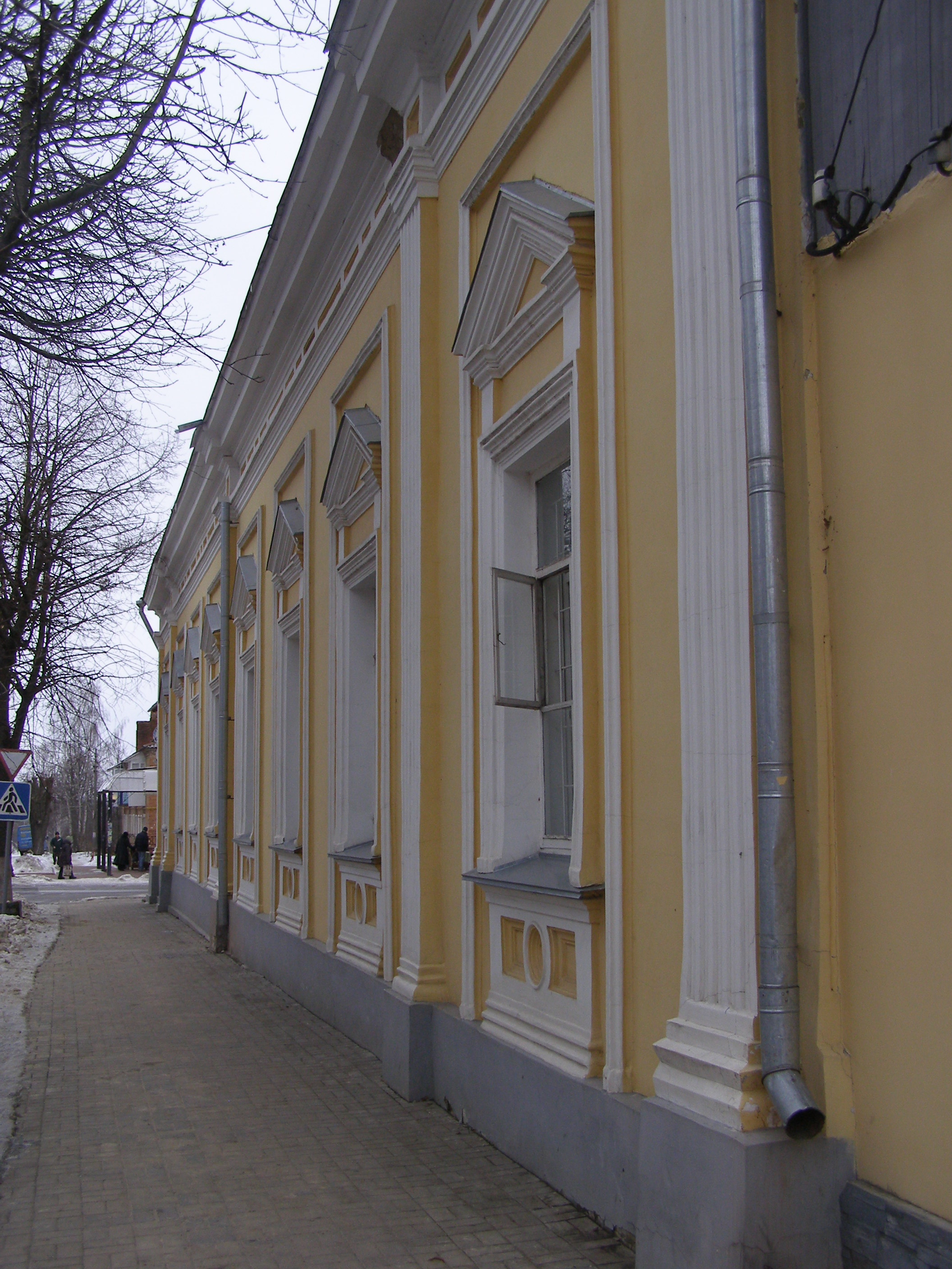 Садиба Неплюєвих, Глухів, вул. Києво-Московська, 43 Західна сторона